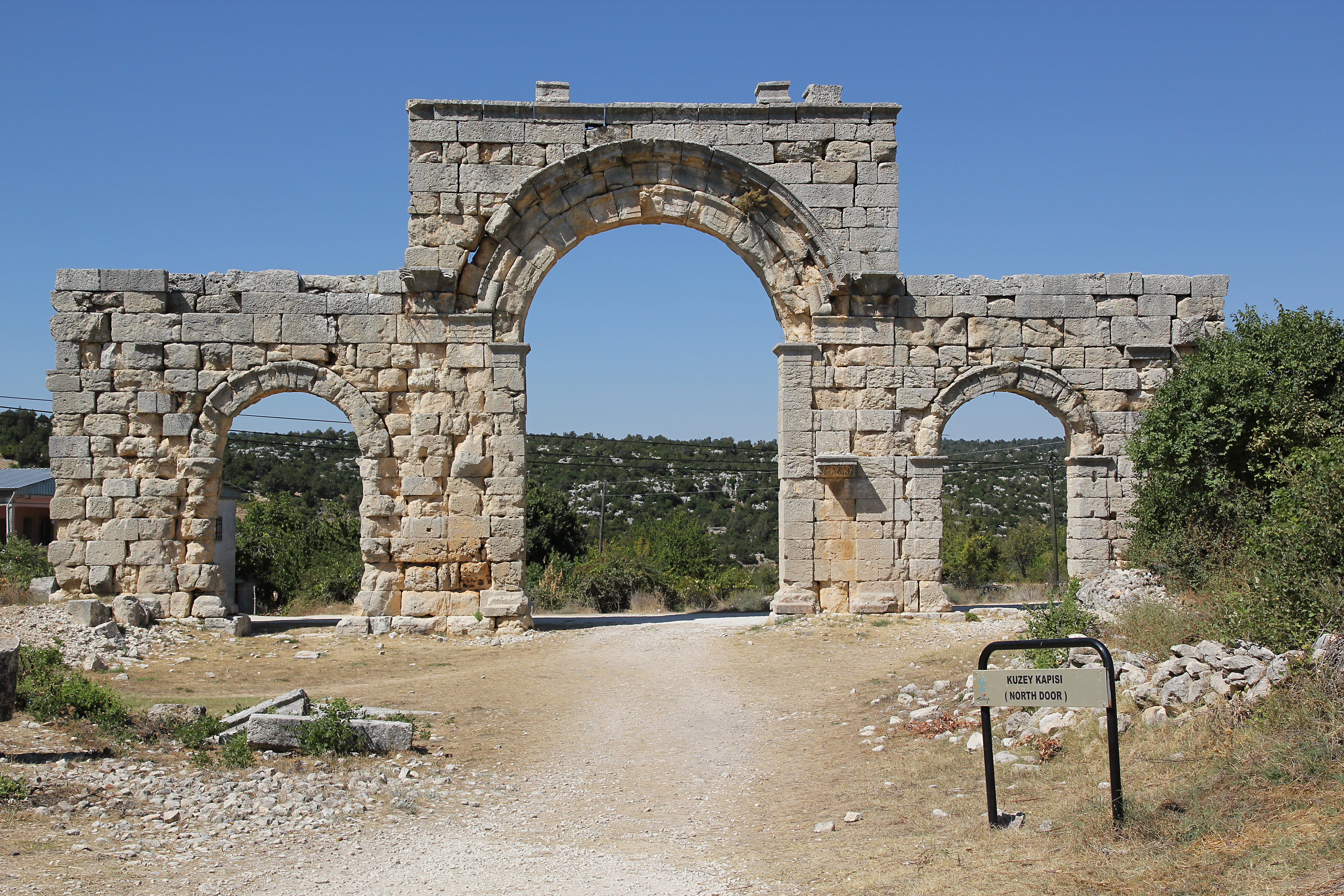 Diokaisareia, antike Stadt in Kilikien bei Uzuncaburç, Südtürkei, Nordtor